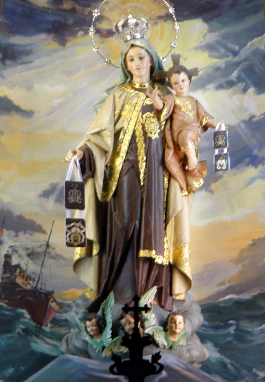 Santander - Iglesia de Nuestra Señora del Carmen y Santa Teresa (PP Carmelitas)